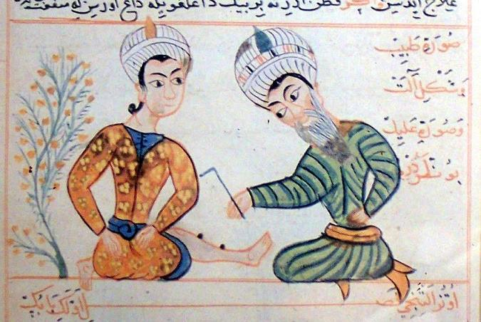 Die Behandlung eines Beinbruchs, Miniatur aus Cerrâhiye-i Ilhâniye von Sabuncuoğlu Sharaf al-Din.